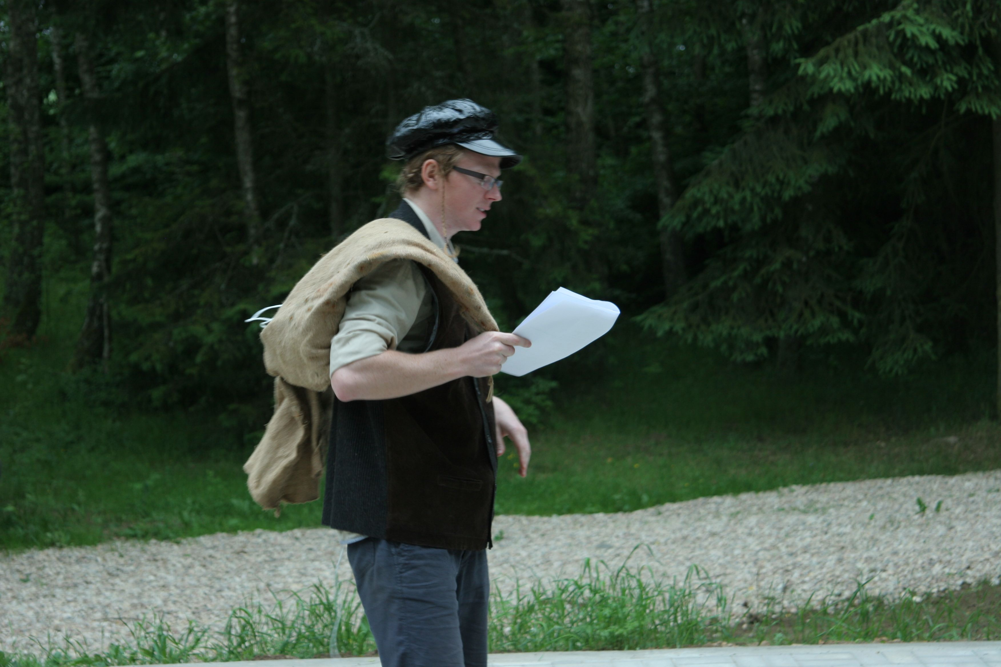 Uczestnicy obrzędu ścinania kani - łowczy